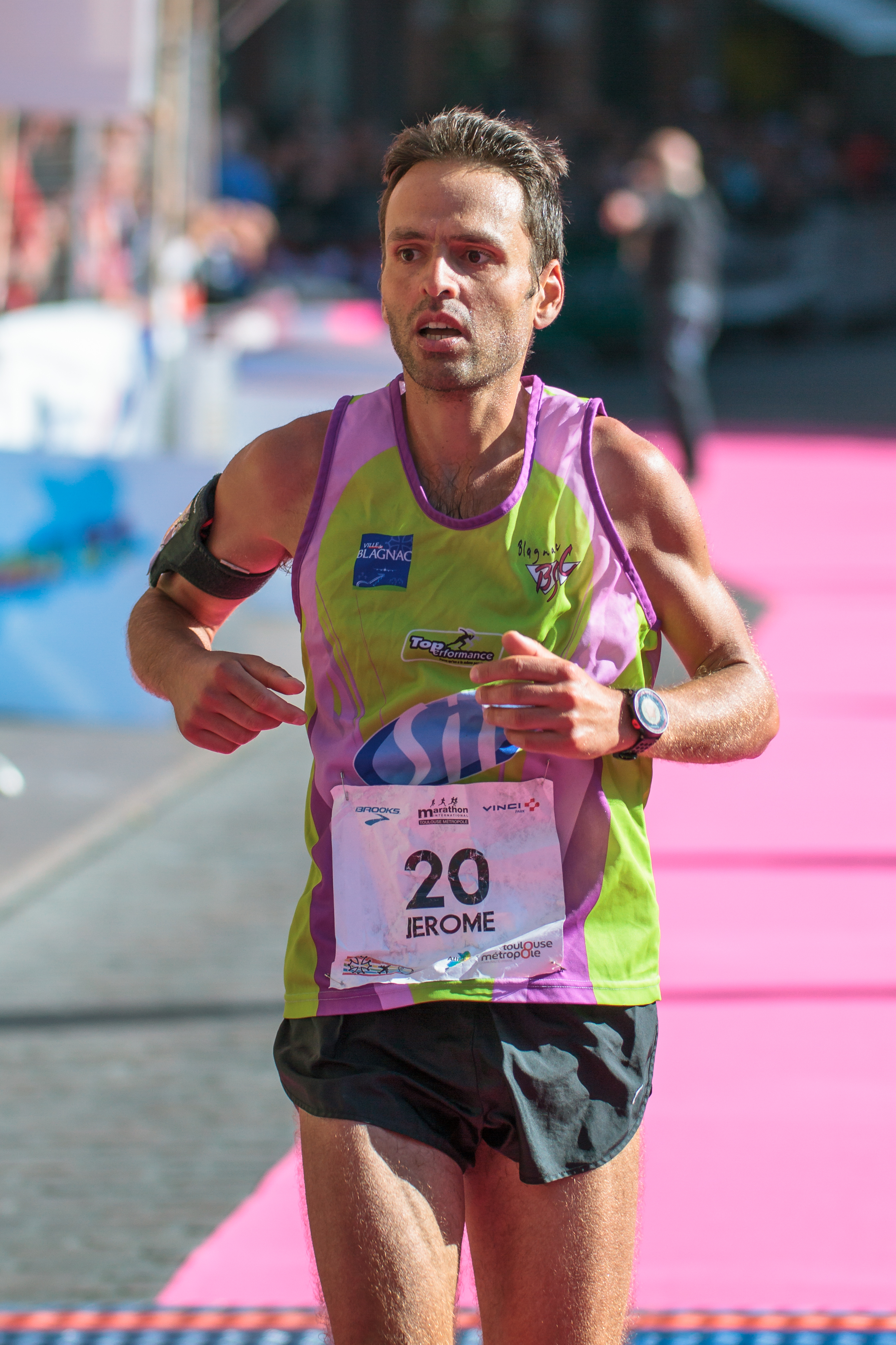 Jérome Bellanca lors du marathon de Toulouse 2014 franchissant la ligne d'arrivée.